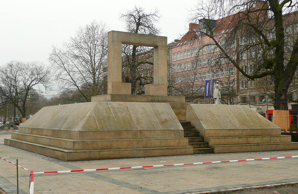 Mahnmal am Opernplatz Hannover für die 6.800 jüdischen Bürger, die aus Hannover deportiert wurden